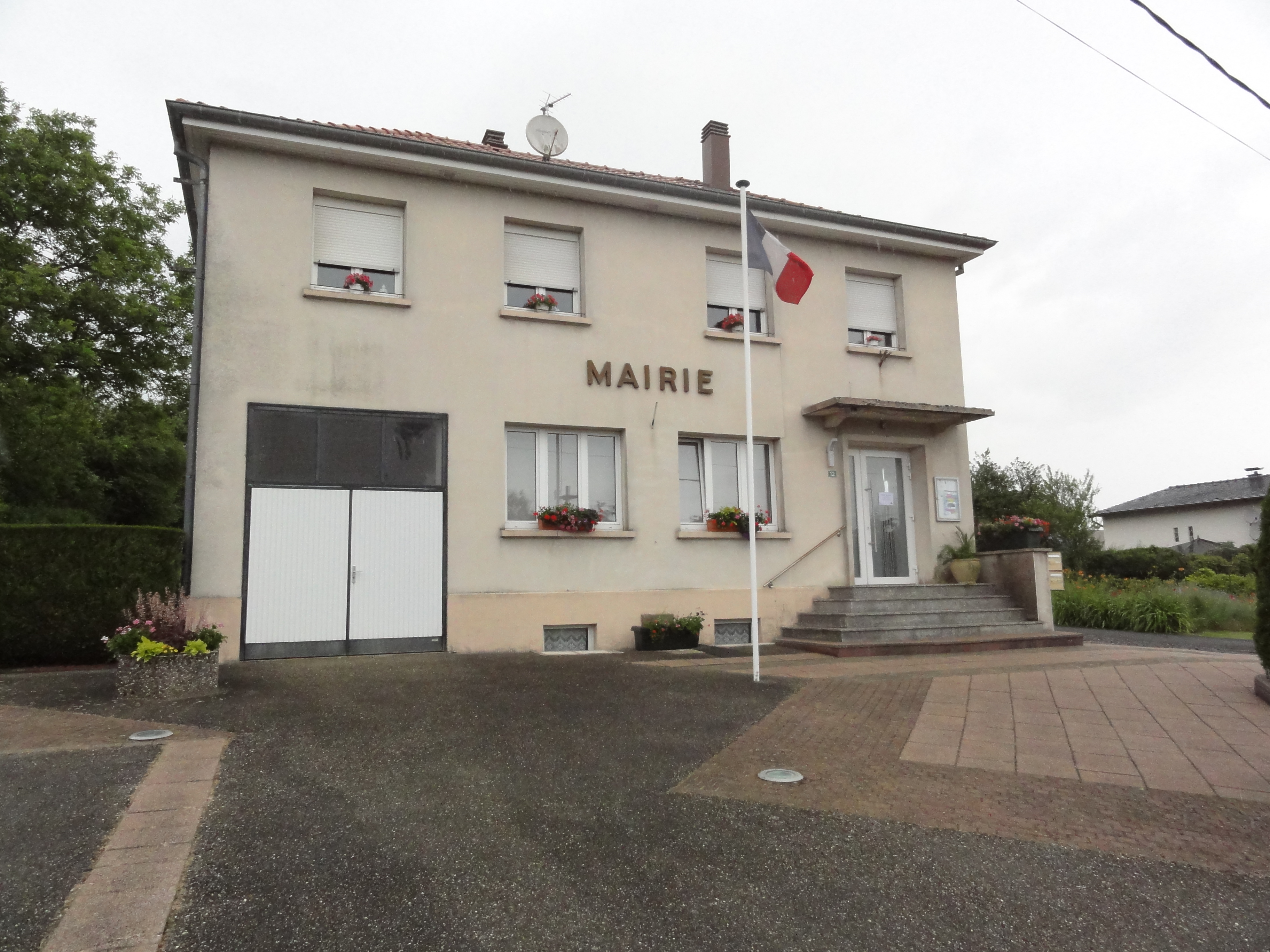 Hertzing (Moselle) mairie